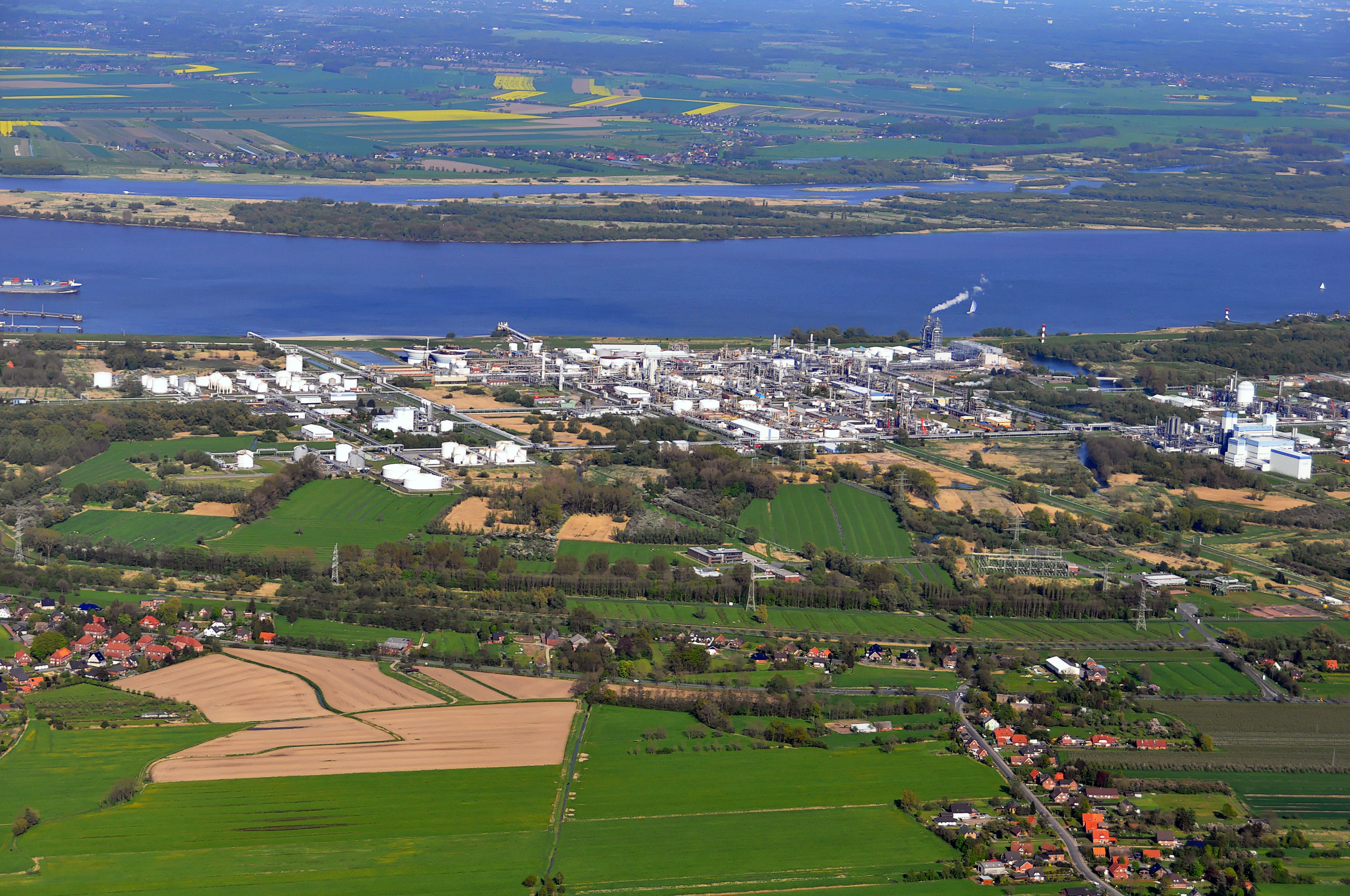 Luftbilder von der Nordseeküste 2012-05; Stade, Bützfleth, DOW-Werk, davor Schaltwerk Götzdorf